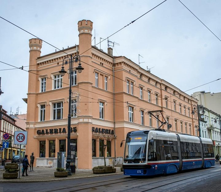 Kamienica ul. Gdańska 17 w Bydgoszczy